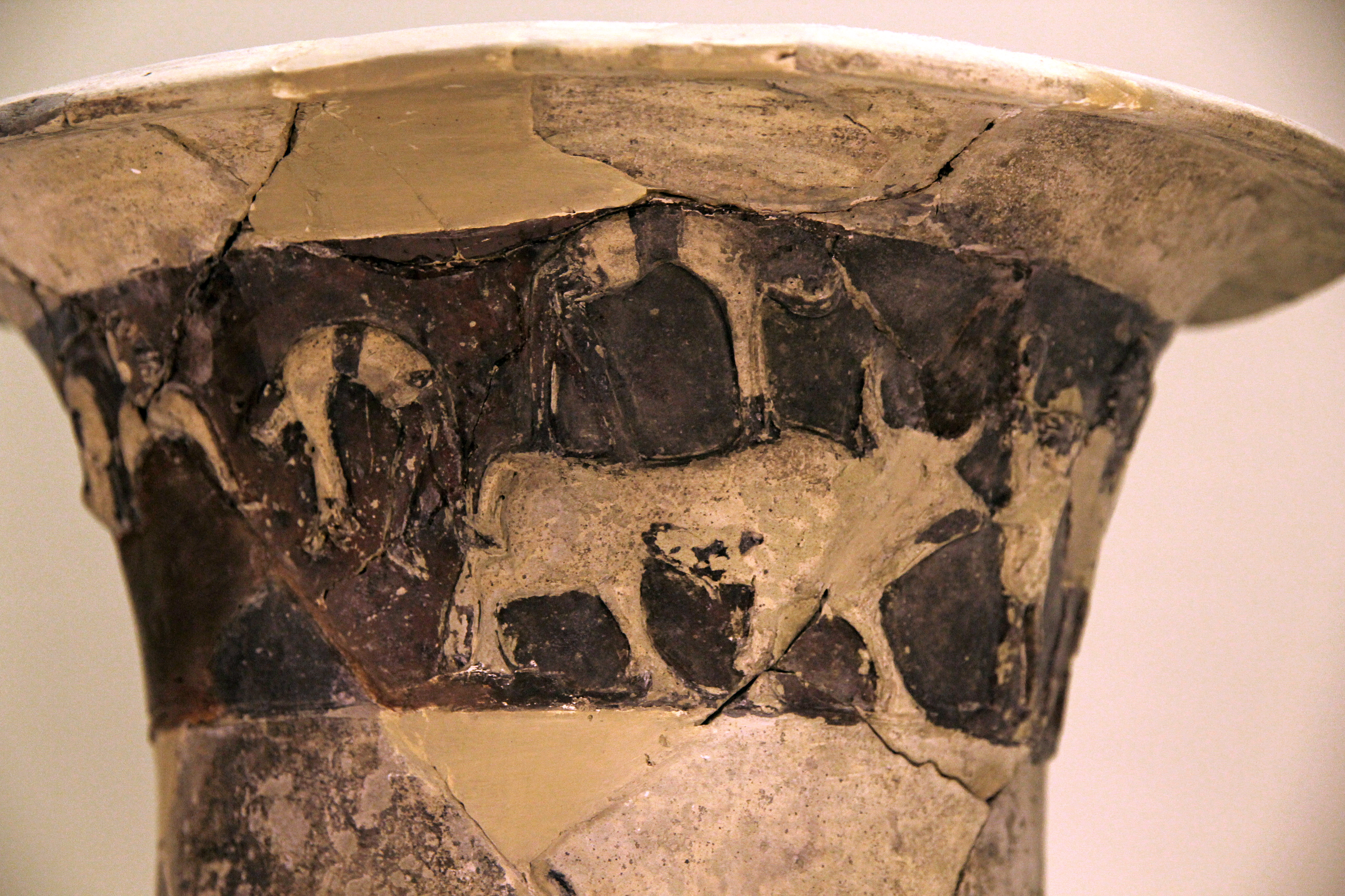 Archäologisches Museum Çorum, Zentraltürkei, frühhethitische Vase B aus Hüseyindede, Detail Stierspringer